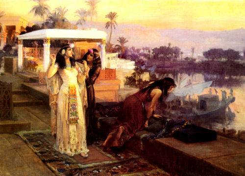 Cleopatra con sus doncellas